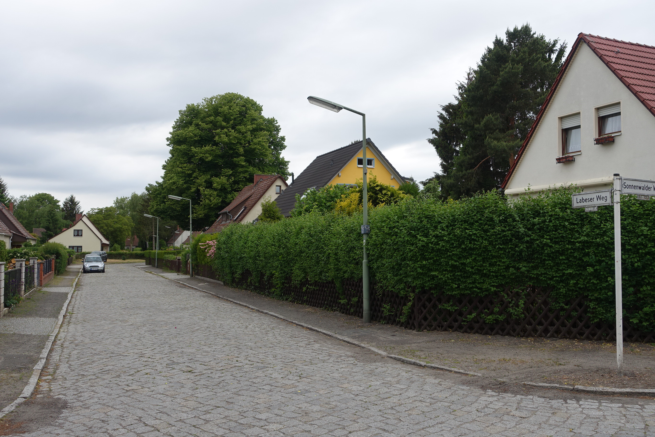 Straßenpanorama